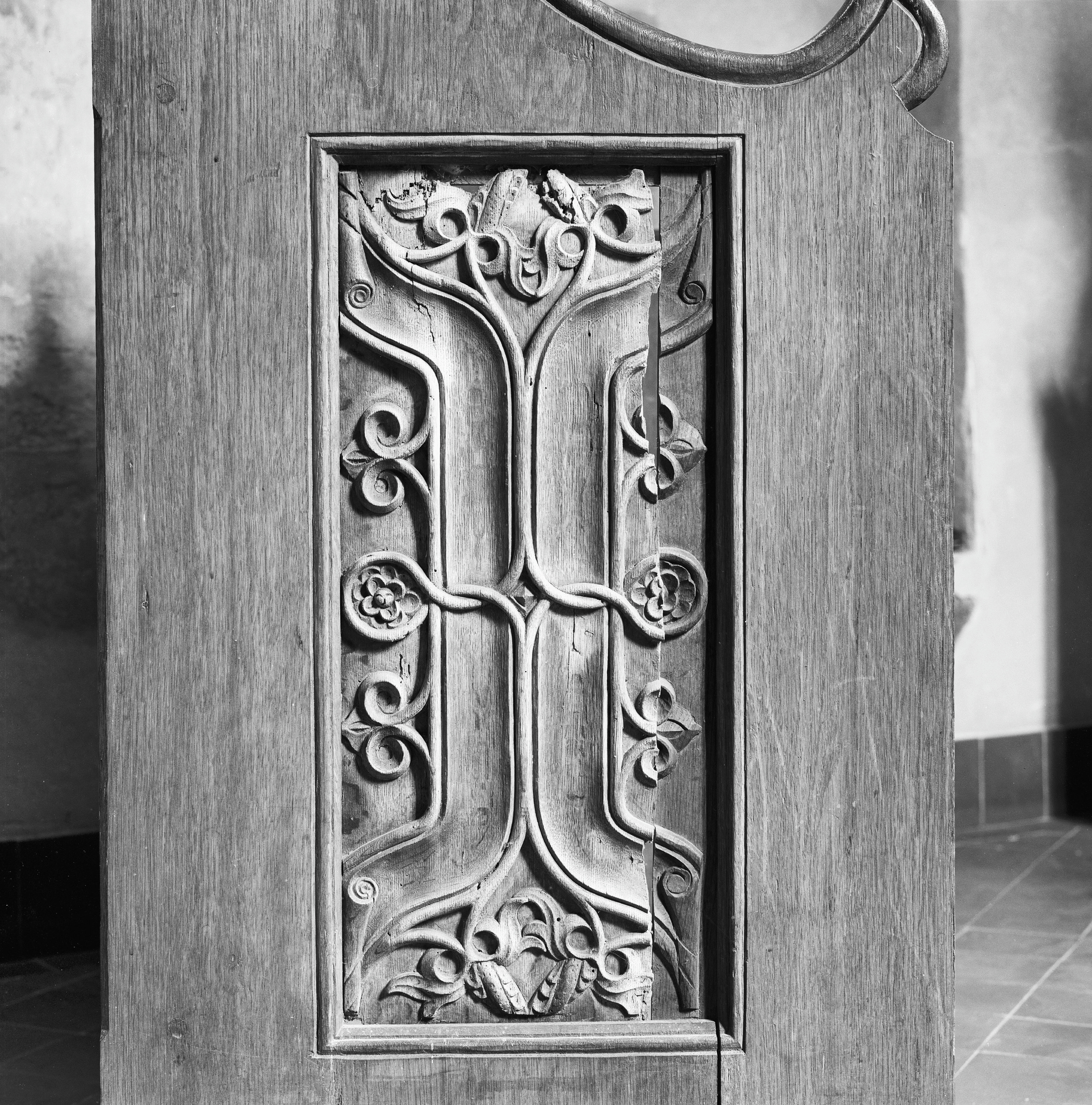 Nederlands Hervormde Kerk: gothisch briefpaneel